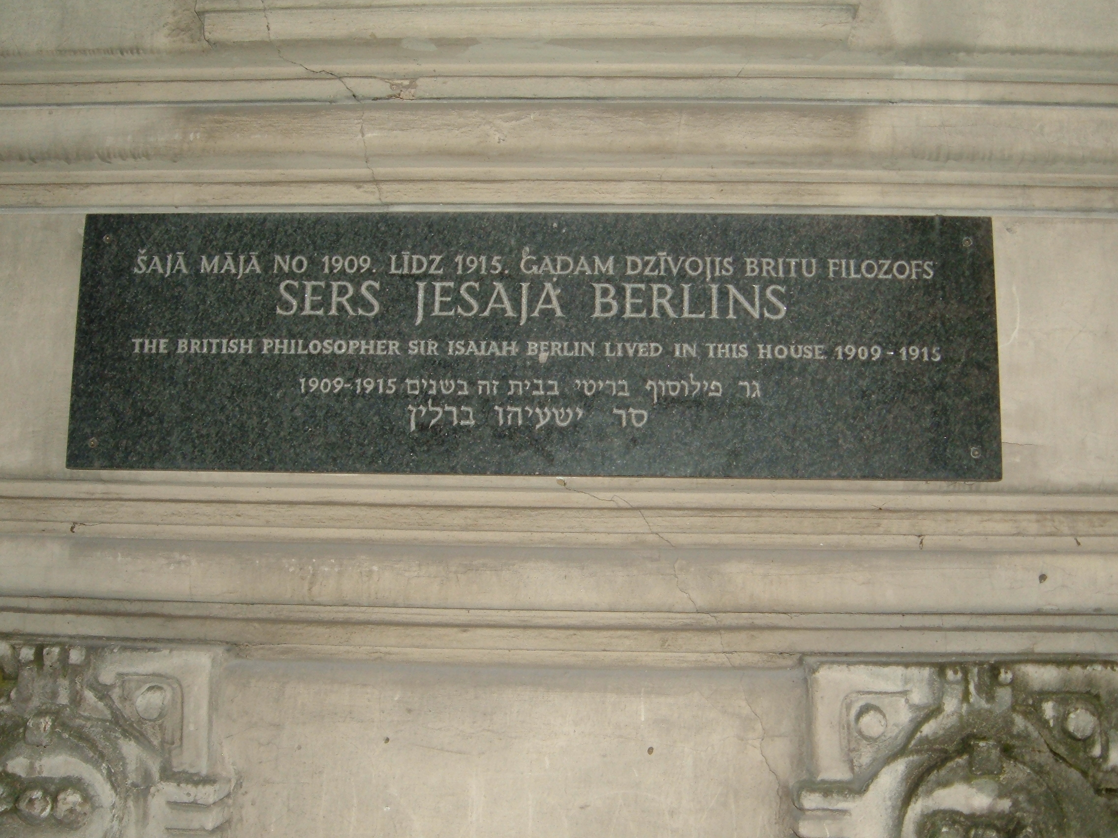 Мемориальная доска на доме в Риге, где прошли первые годы жизни Исайи Берлина Alberta iela 2a